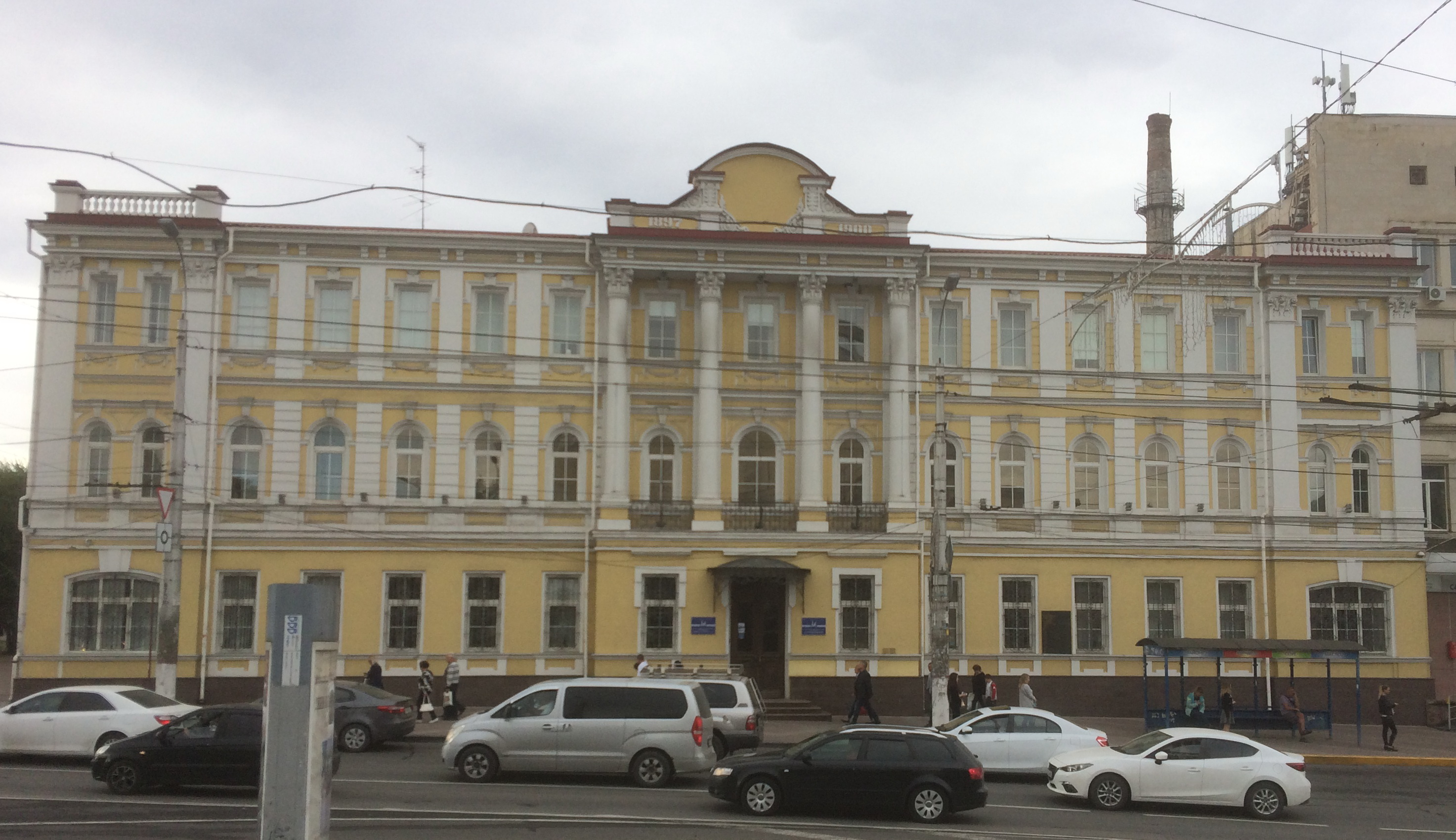 Здание Черноморнефтегаз (Симферополь). Бывшее здание казённой палаты, 1897-1900, архитектор А. И. Карапетов